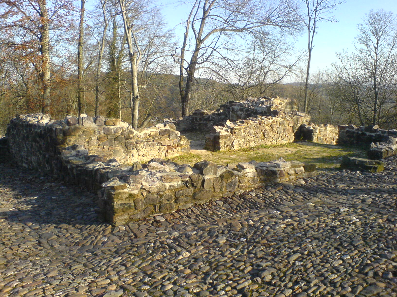 Burgruine Dagstuhl